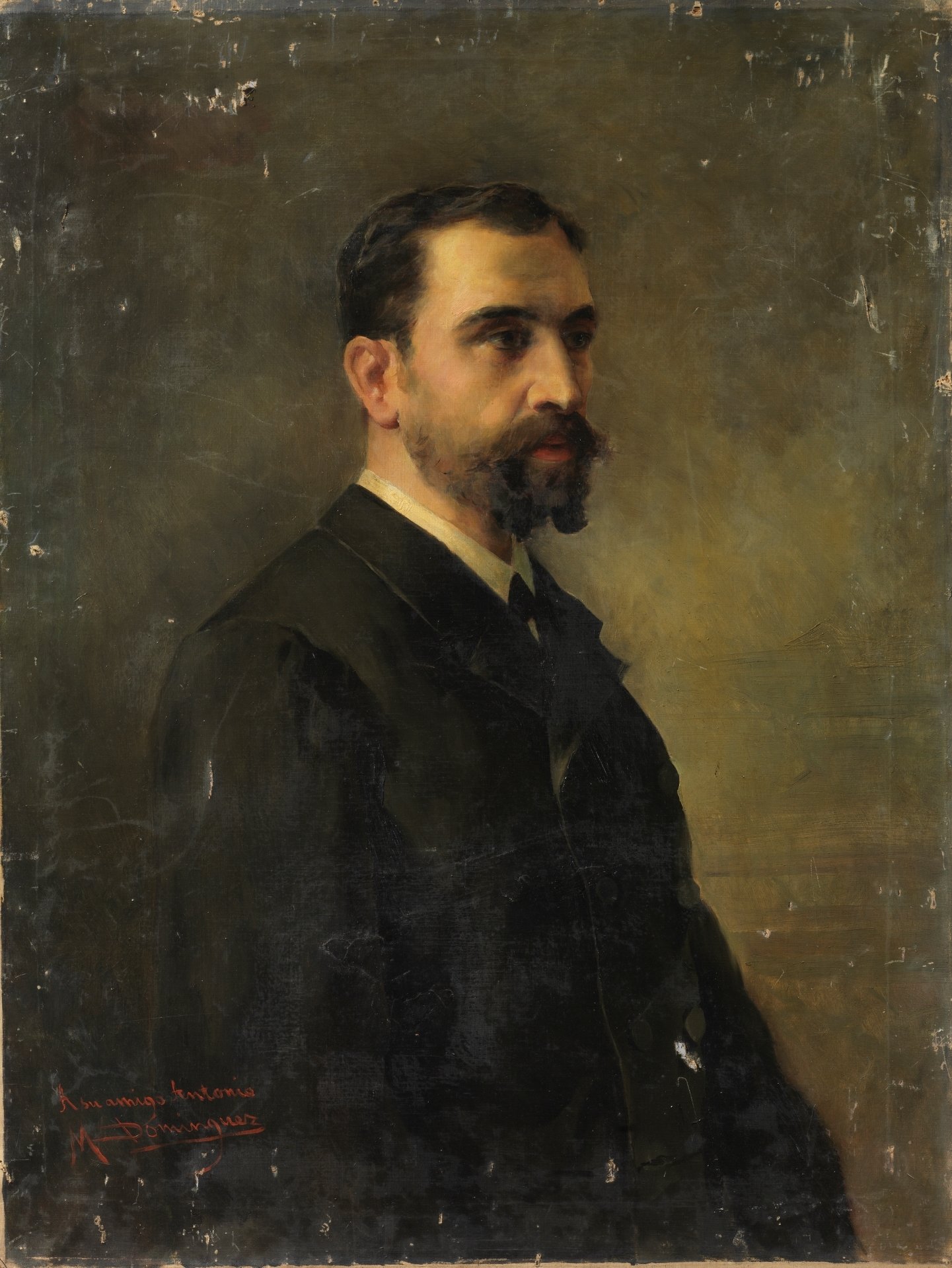 Retrato del filósofo, periodista y político español Antonio del Val (1839-1866).